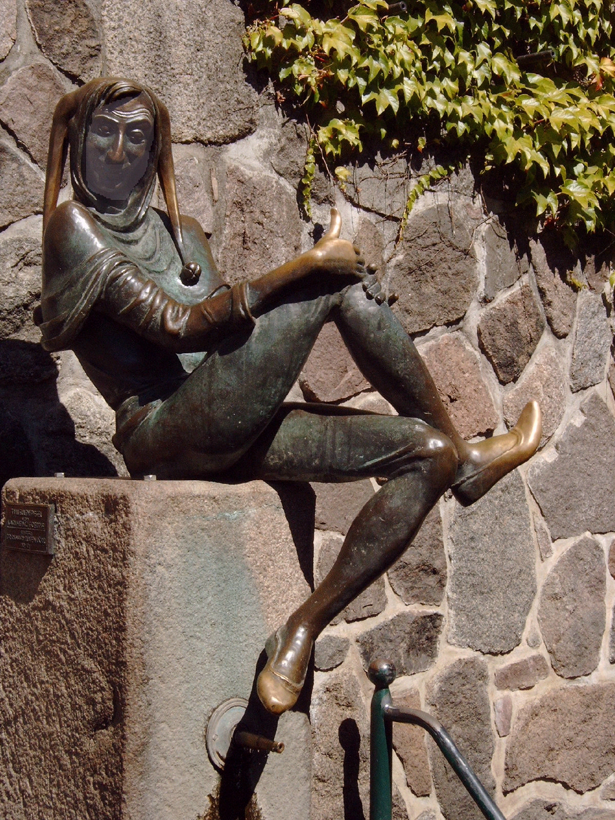 Eulenspiegelbrunnen in Mölln Fotograf: Hans Weingartz Aufnahme: 5.8.2004 Url: 11:33, 9. Aug 2005 Leonce49 1200 x 1600 (1698880 Byte) (Eulenspiegel in Mölln)